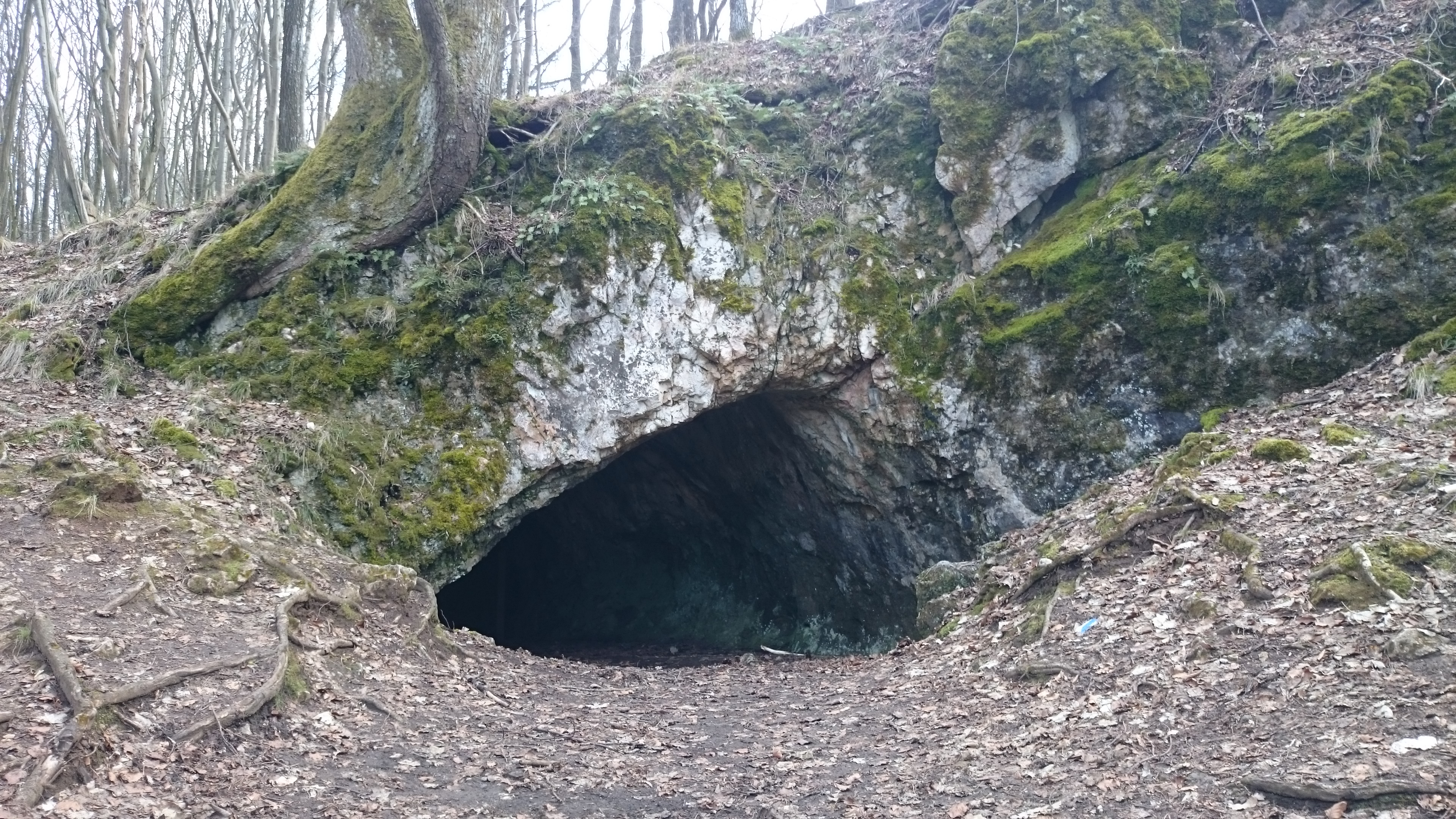 Jedno z wejść do jaskini Piekło